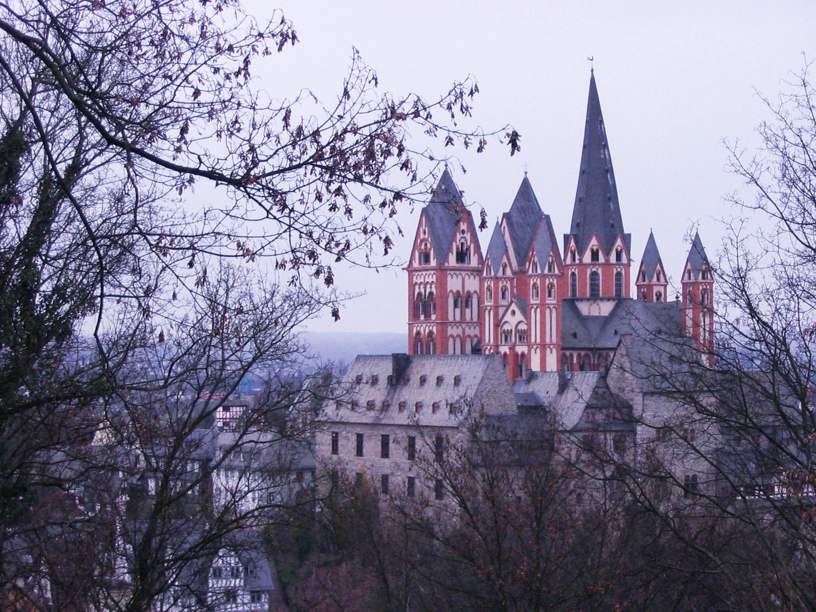 Selbstfotografiertes Bild vom Limburger Dom. Wurde vom "Greifenberg" aus aufgenommen.